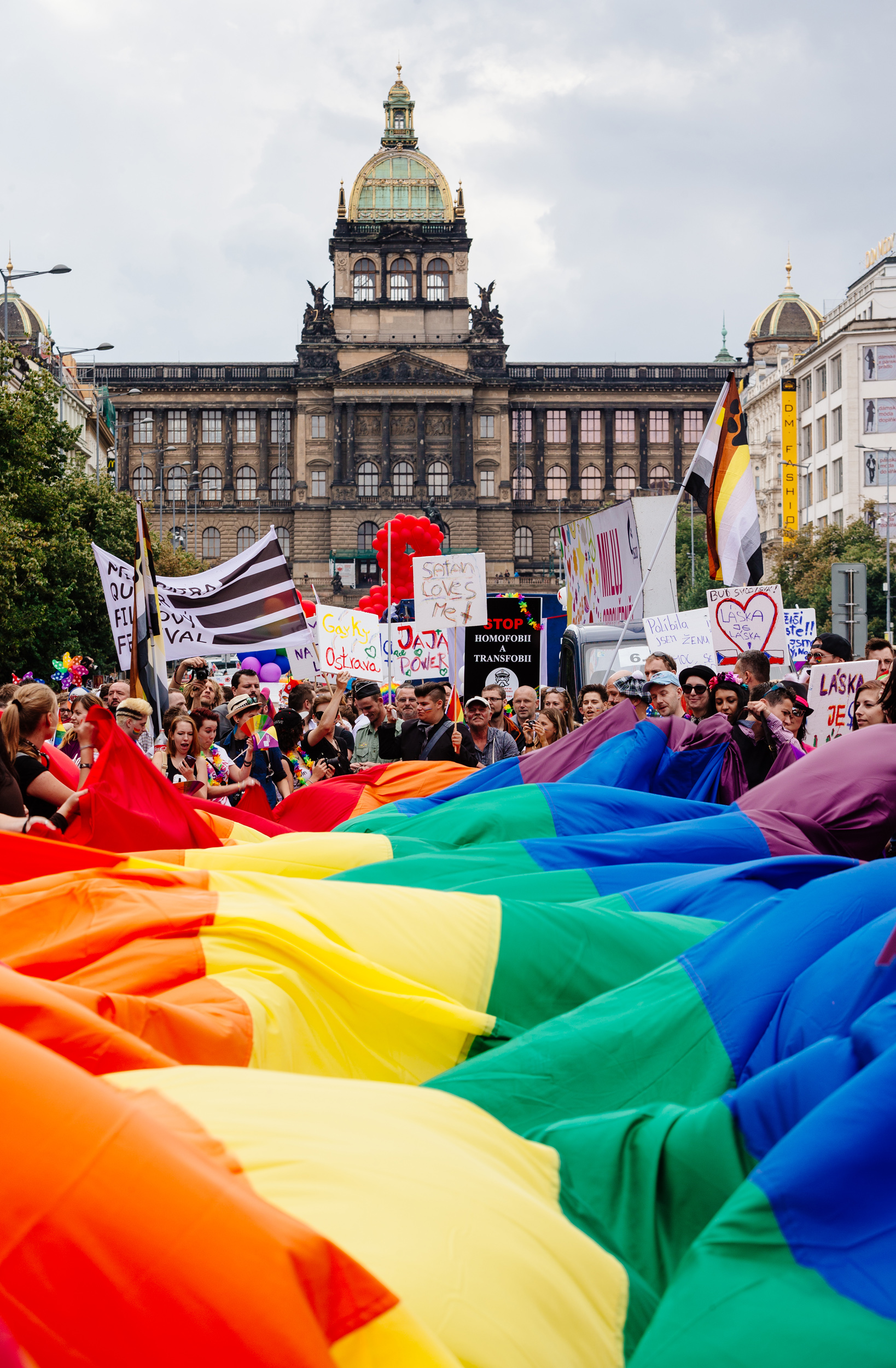 Prague Pride 2014, shromáždění na Václavském náměstí